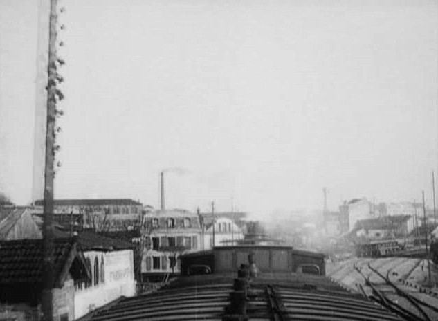 Méliès, Panorama pris d'un train en marche (Star Film 151, 1898)